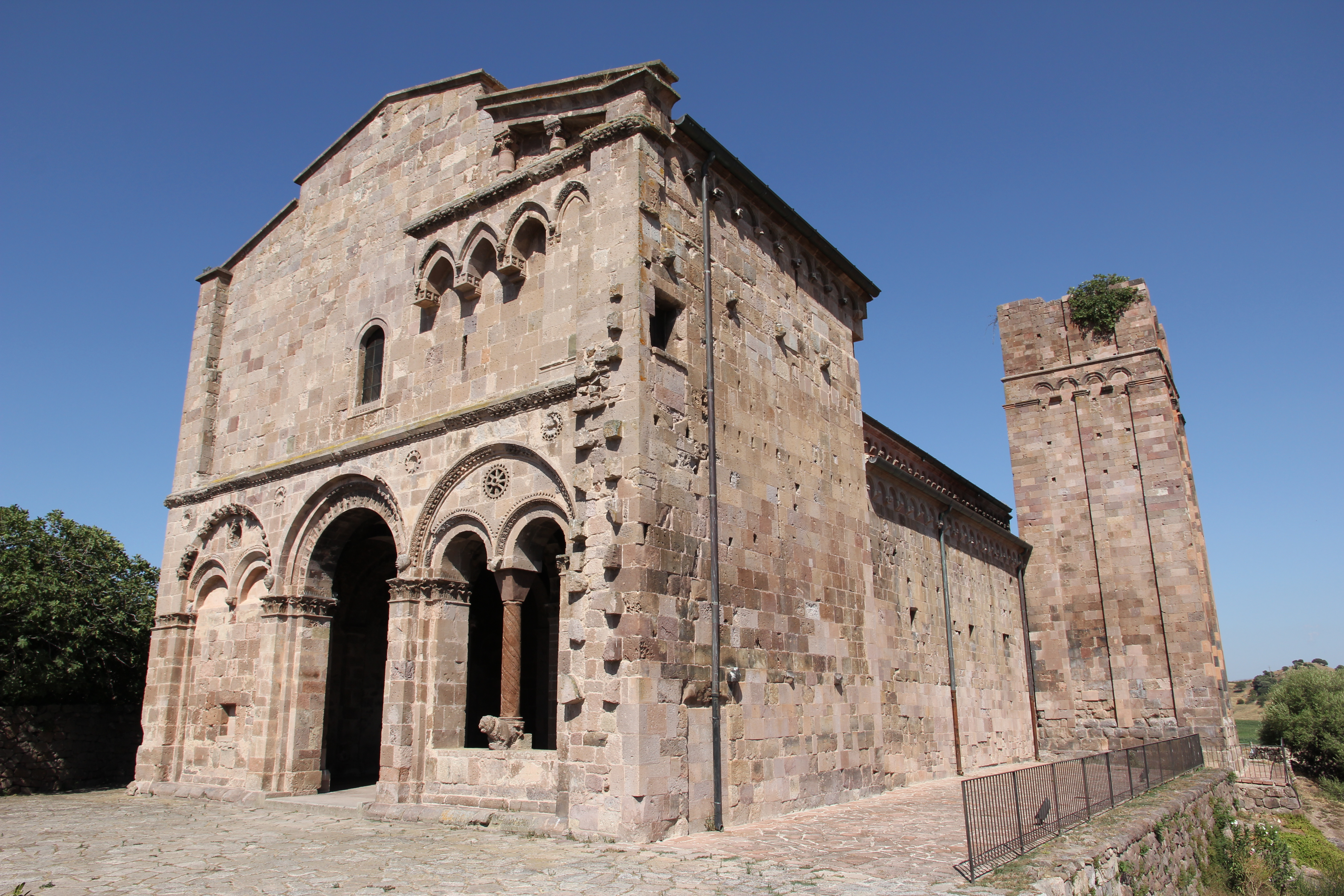 Ozieri - Basilica di Sant'Antioco di Bisarcio